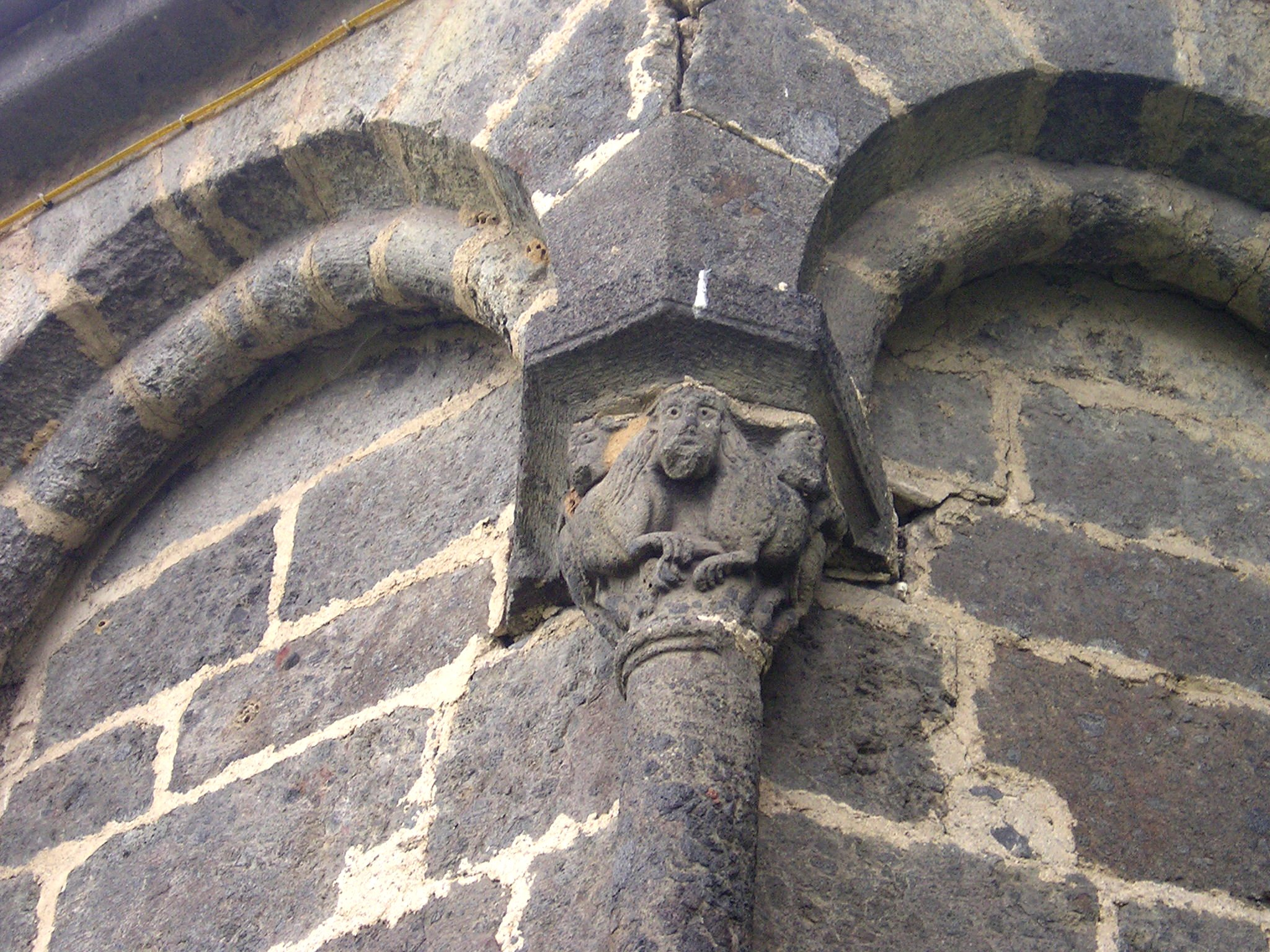 Romanische_Kirche_von_Roffiac_Absidenschmuck